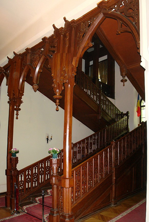 Scara principală a Palatului Știrbei din Buftea 01